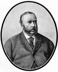 Ростислав Андреевич Фадеев (1824 - 1883) - видный общественный и военный деятель, писатель и публицист. Дядя Е.П. Блаватской